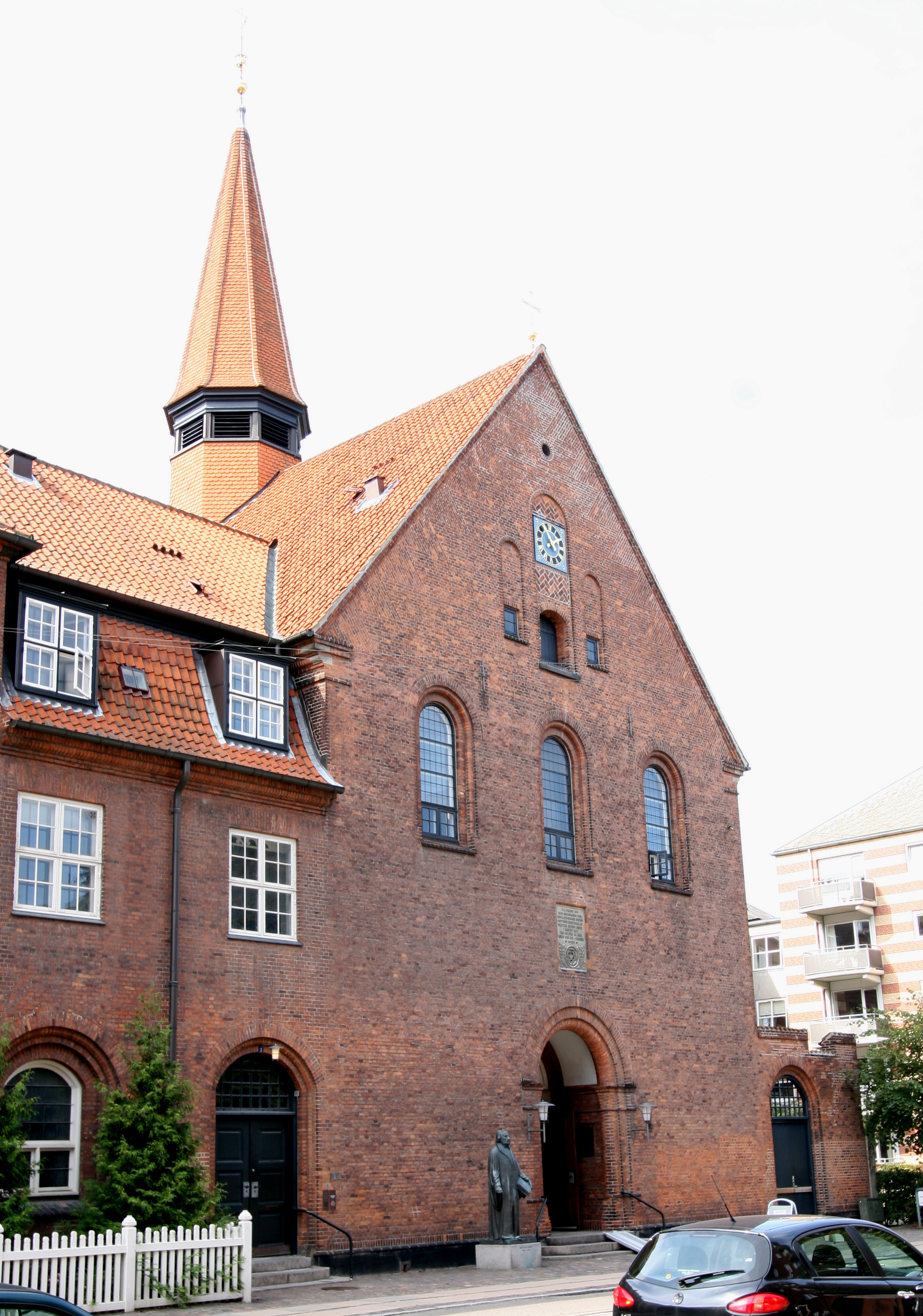 Luther Kirken in Copenhagen, Denmark.